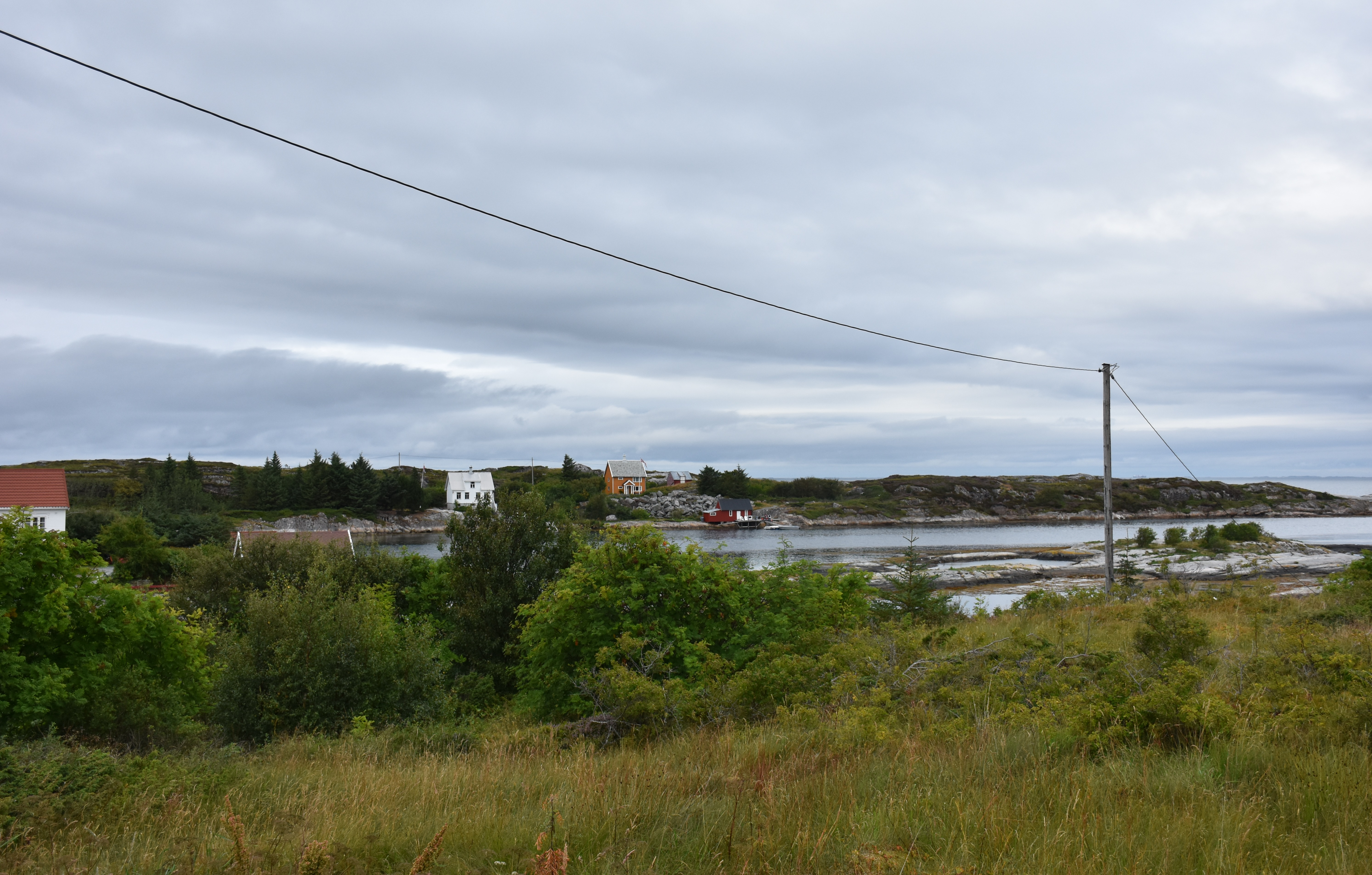 Øksenvågen på Averøya